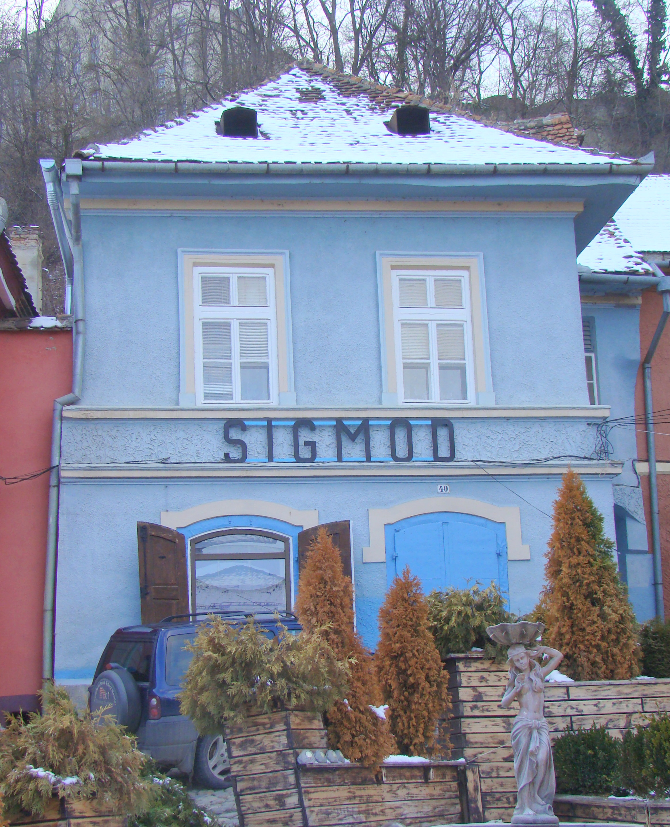 Casa Wohl, municipiul Sighișoara, Piața Oberth Hermann 40 sec. XVIII - XIX